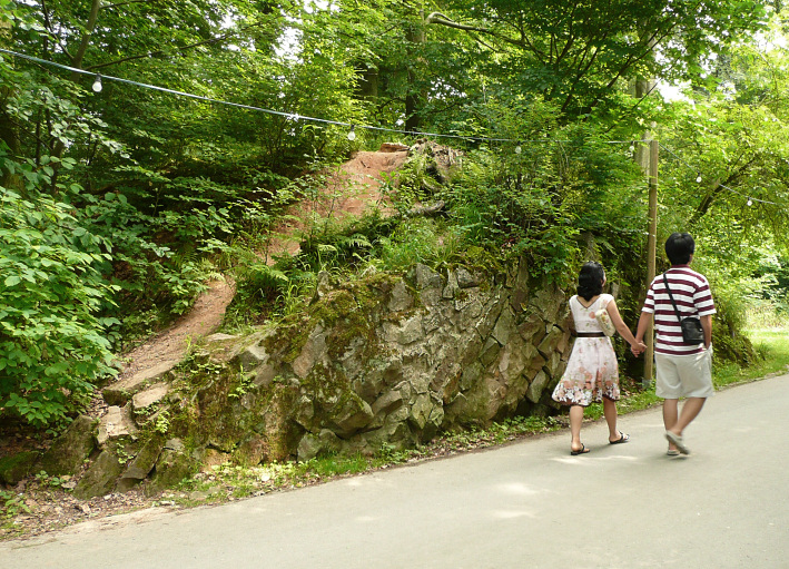 Ringwall Marienberg